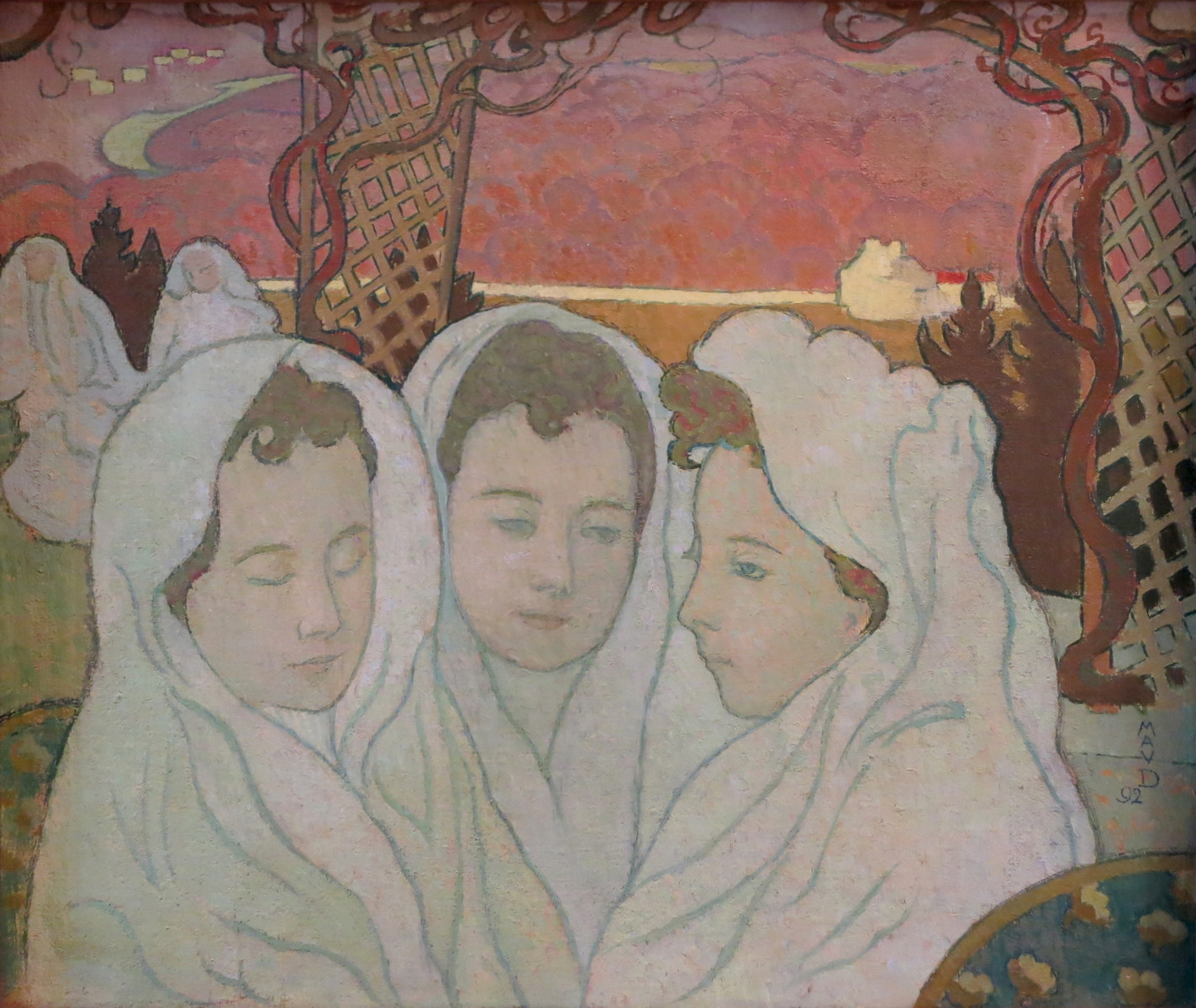 Triple portrait de Marthe fiancée